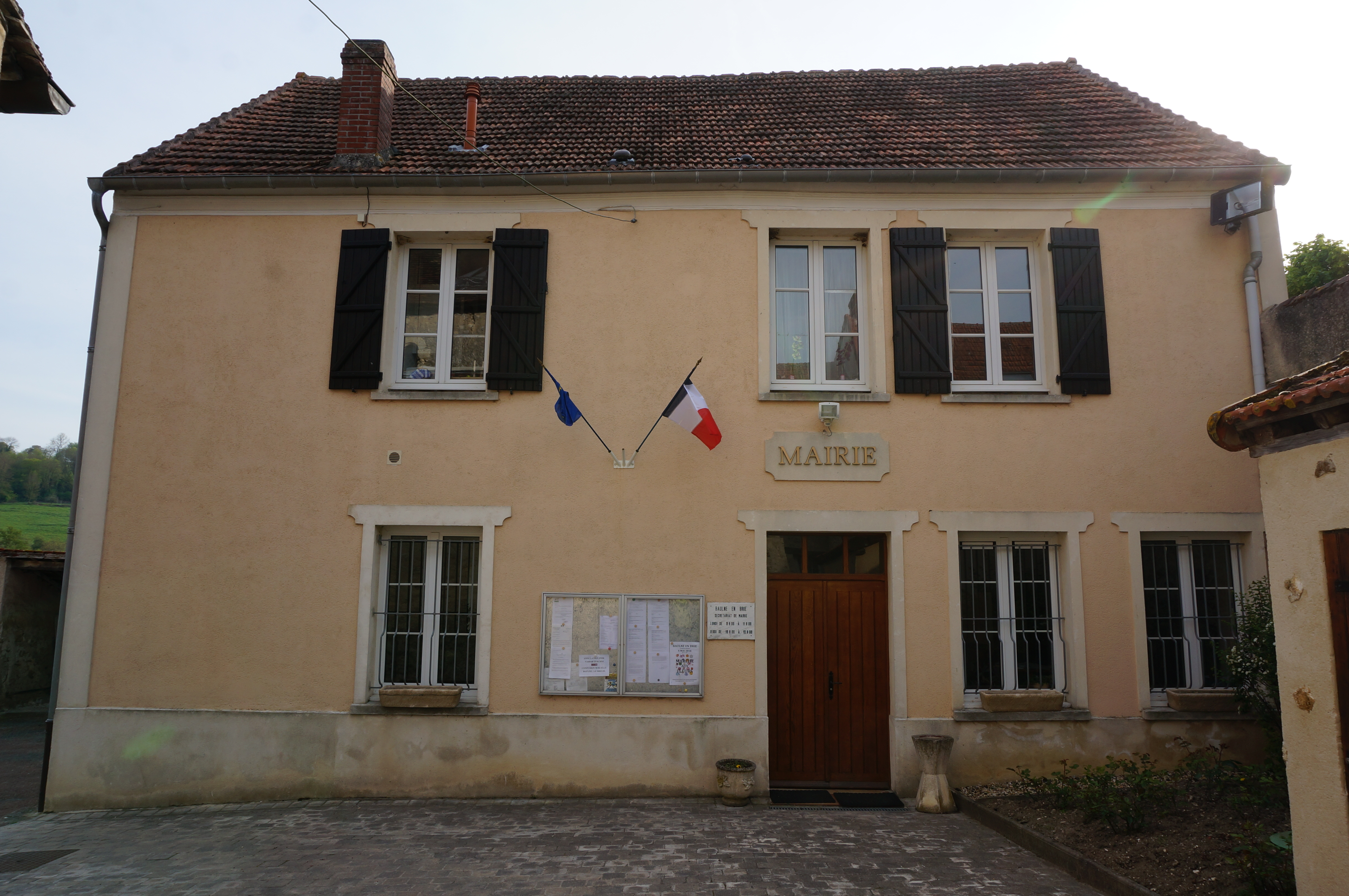 à Baulne-en-Brie.